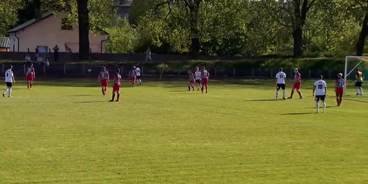 Mecz piłkarski Pogoni Prudnik z LZS Racławiczki rozegrany 5 maja 2018.